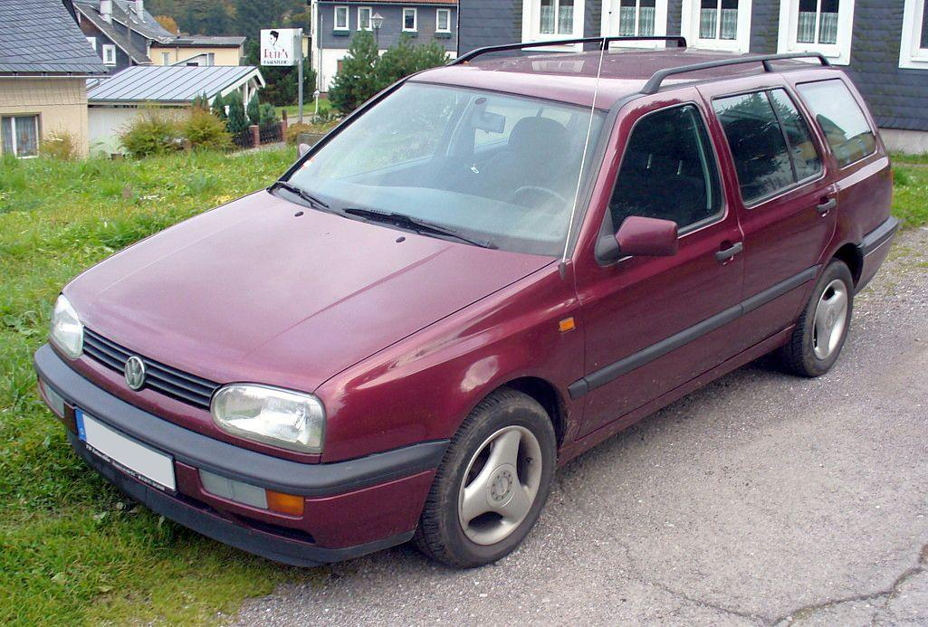 VW Golf III Variant